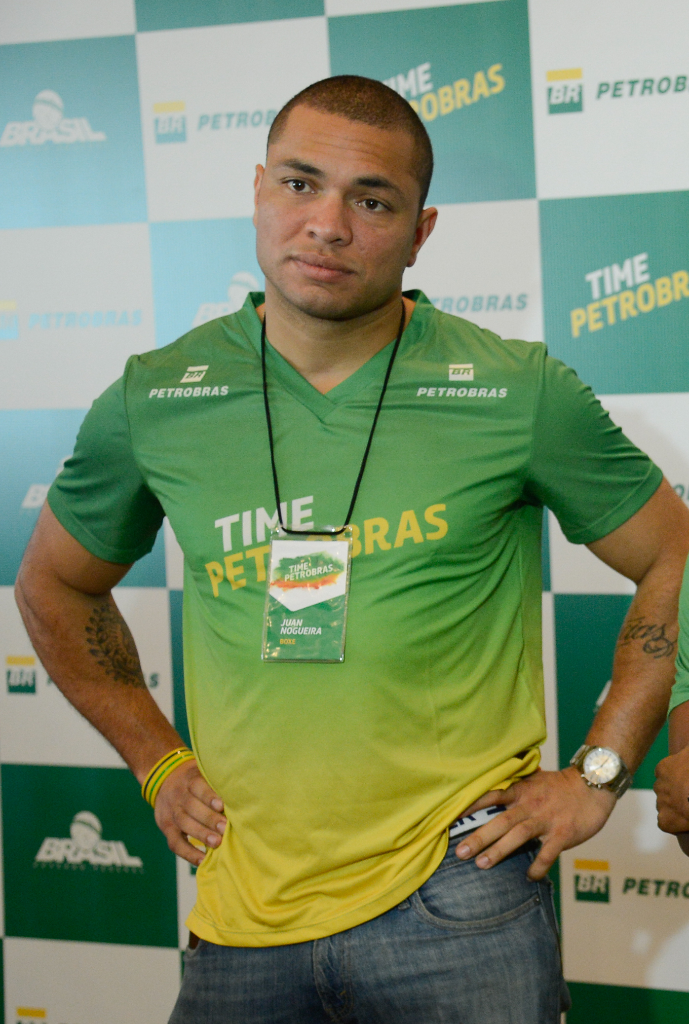 Rio de Janeiro - Os boxeadores Juan Nogueira, Michel Borges e Patrick Lourenço durante recepção a atletas olímpicos que representam o Brasil nos Jogos Rio 2016 patrocinados pela Petrobras (Fernando Frazão/Agência Brasil)